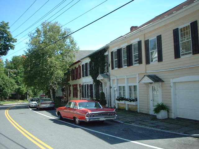 Picture 114